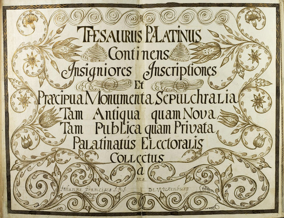 Titelblatt des Thesaurus Palatinus